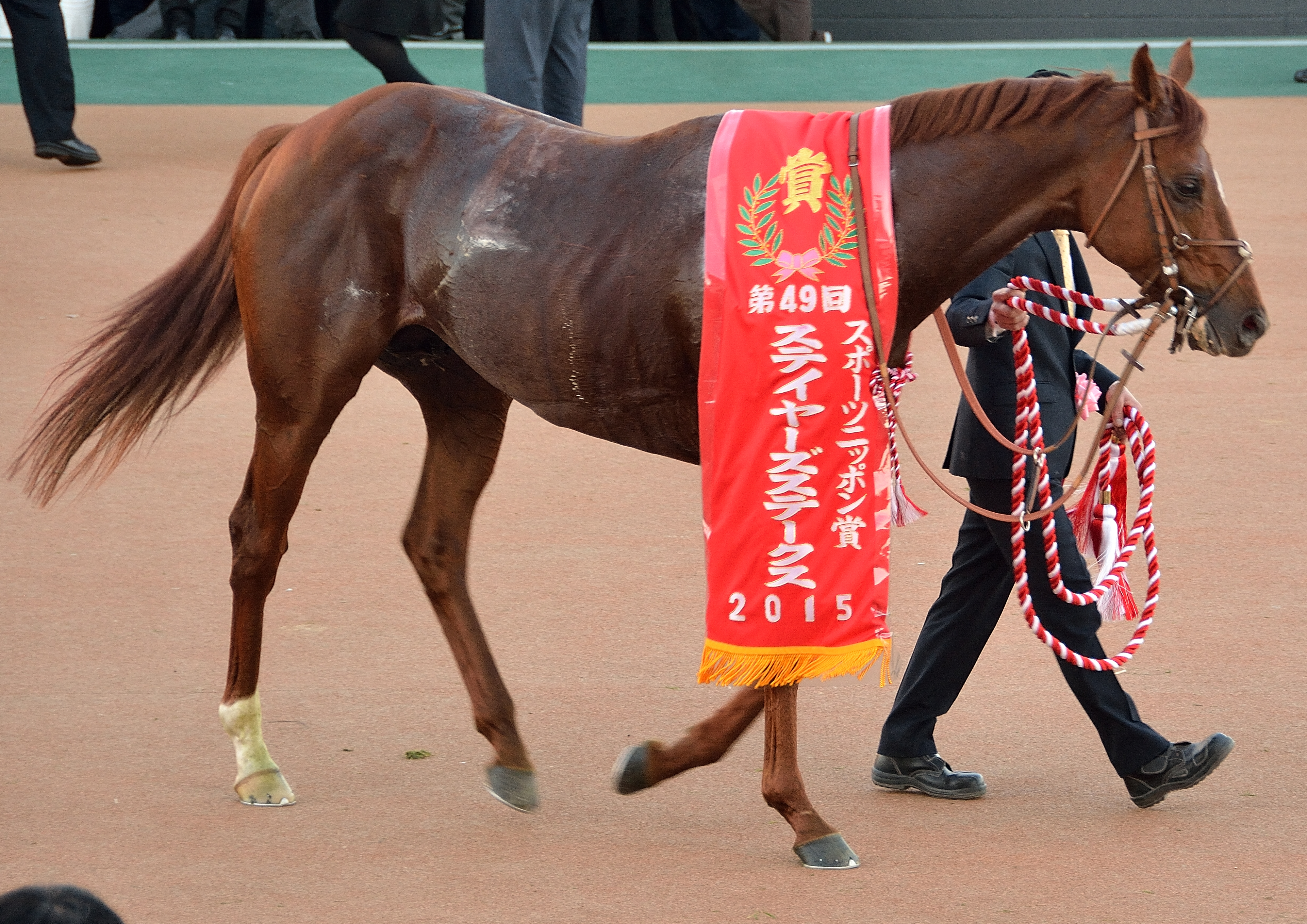 2015年12月5日（土）に中山競馬場の第11競走で行われた「第49回ステイヤーズステークス」で、優勝レイを着装した勝利馬のアルバートを、観客席から撮影したもの。